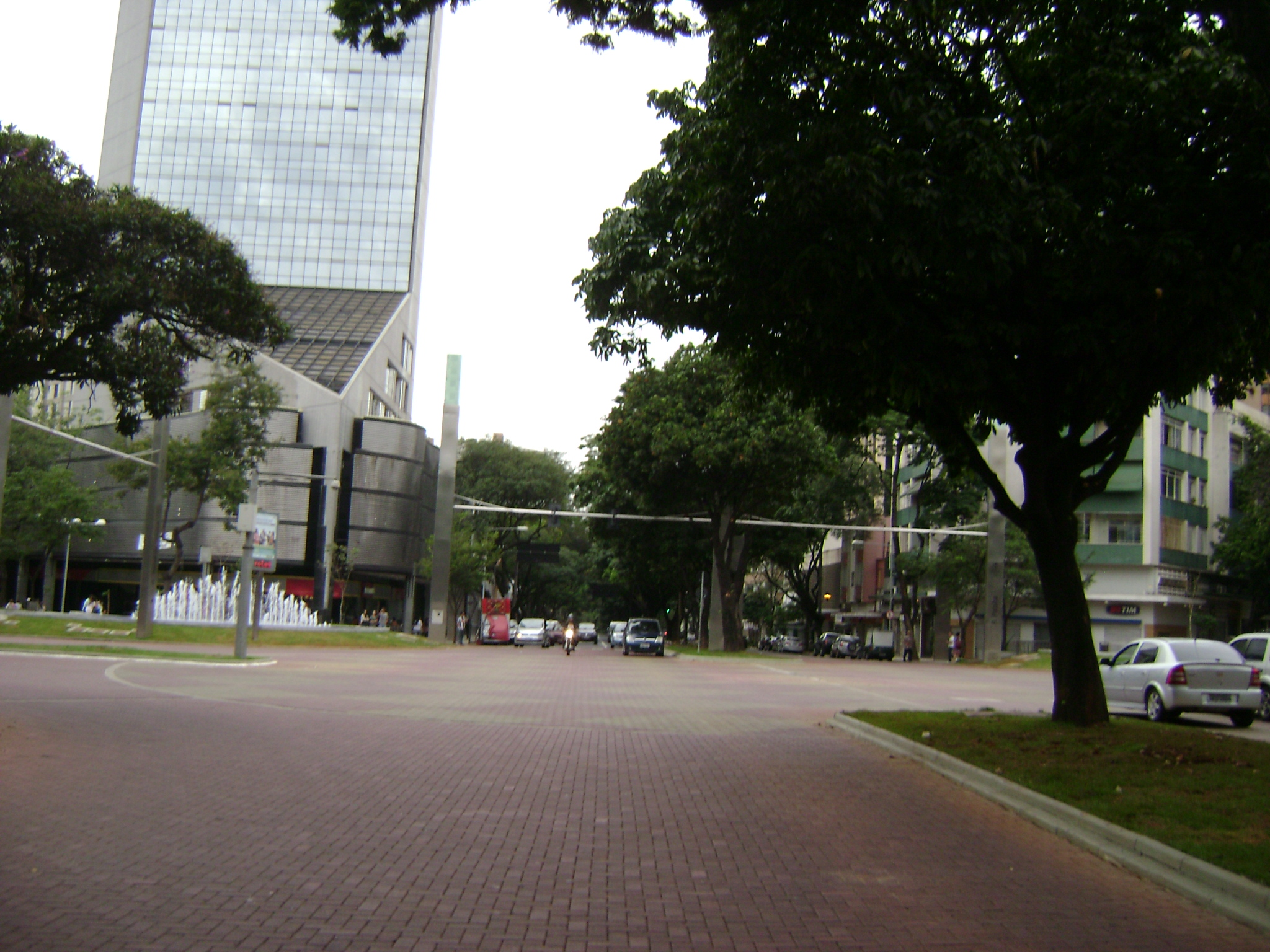 Praça da Savassi após a reforma, em Belo Horizonte, Minas Gerais, Brasil.